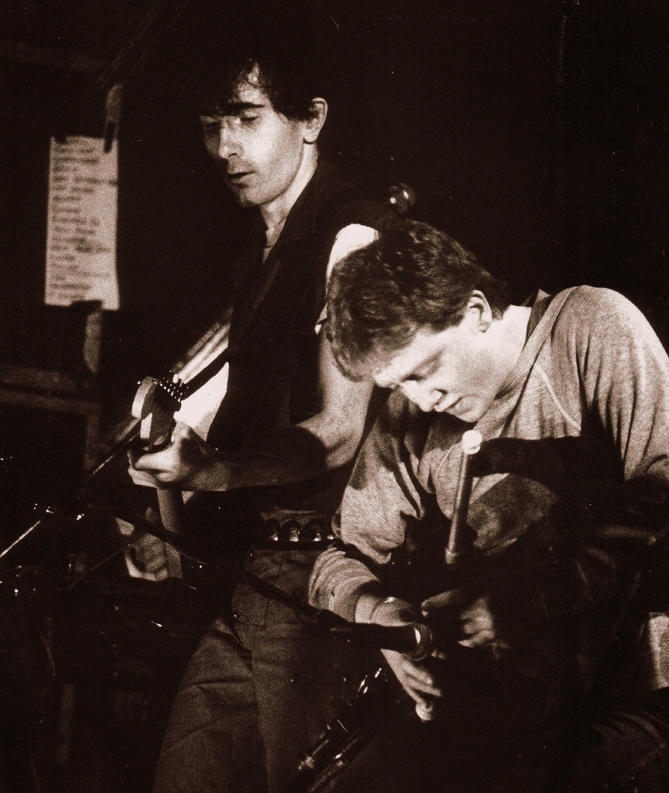 VINNIE PERFORMING WITH U2 WAR TOUR 1983 RDS DUBLIN